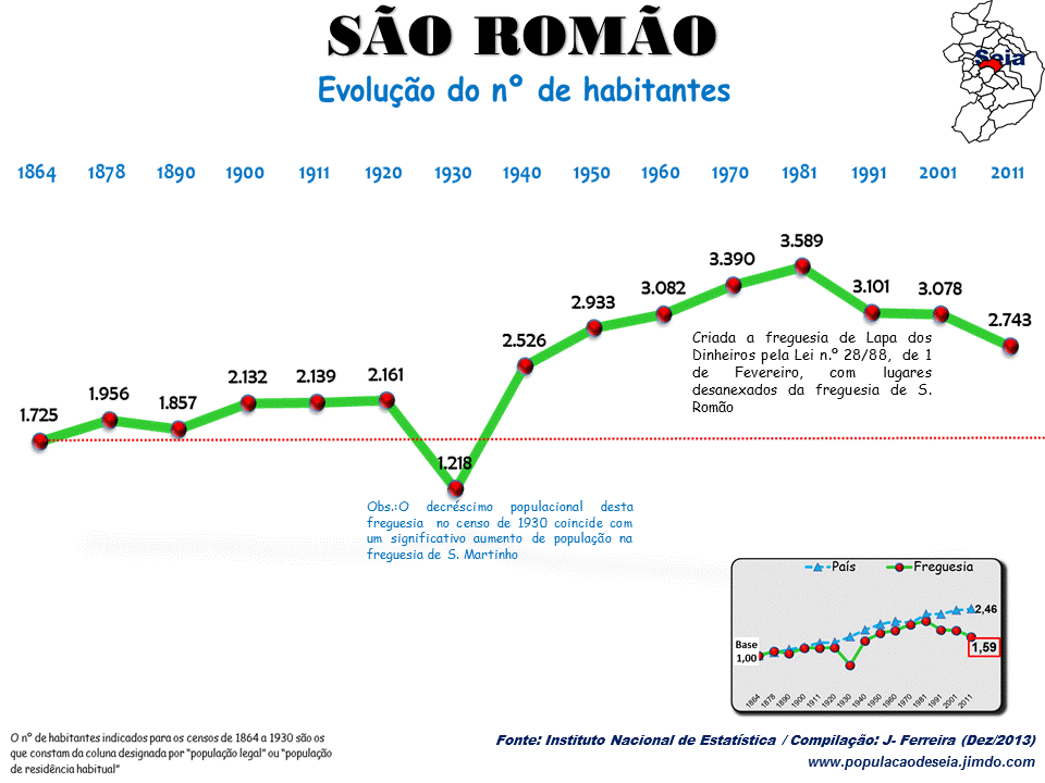 Evolução da População 1864 / 2011